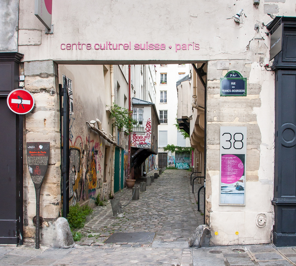 Centre culturel Suisse, Paris. Nombreux panneaux (acces interdit, panneau histoire de Paris type pelle-Starck, panneau nom de rue, panneau d'information.